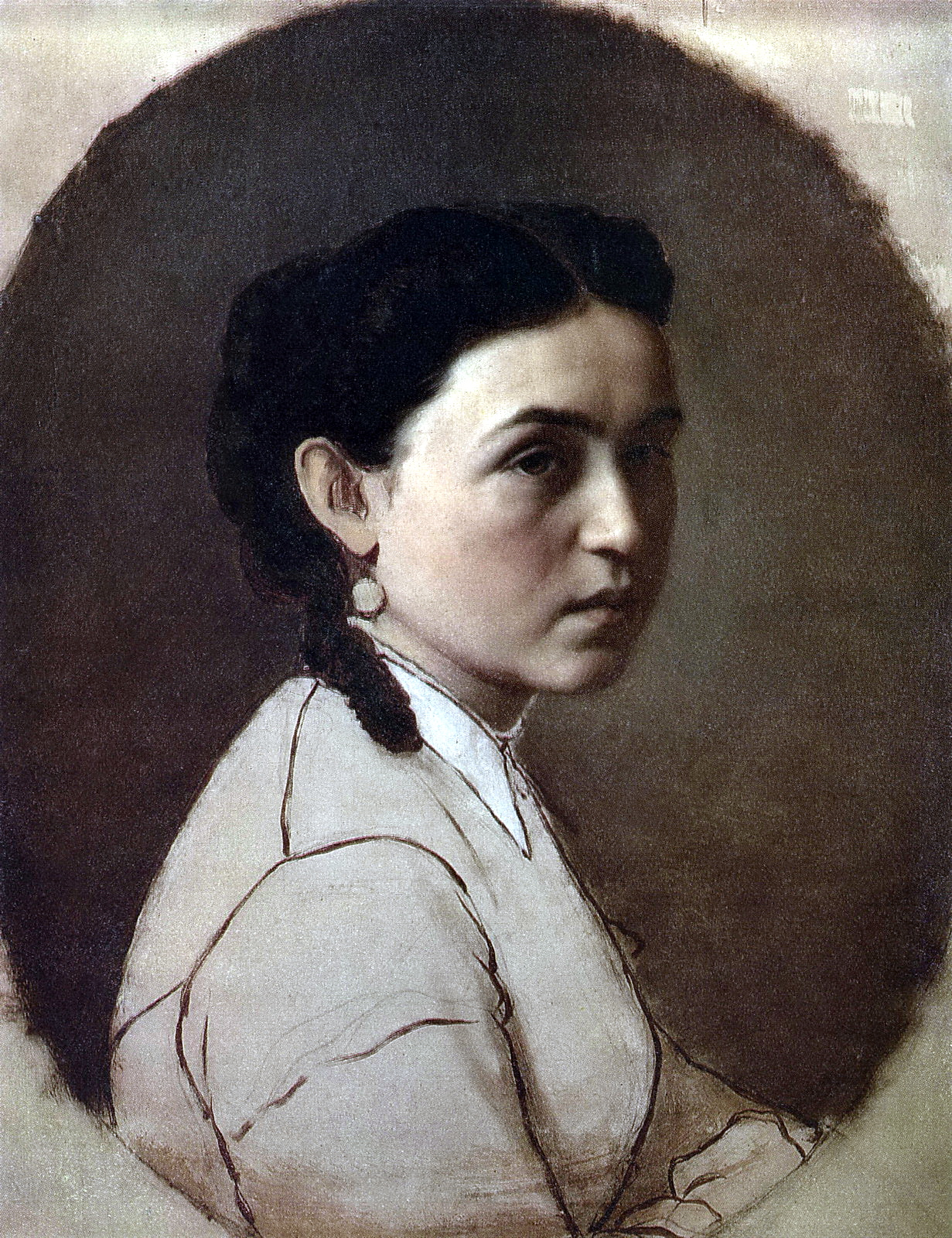 Портрет Е.Э. Перовой Год создания 1868 Материал Холст, масло Собрание Национальный художественный музей Республики Беларусь